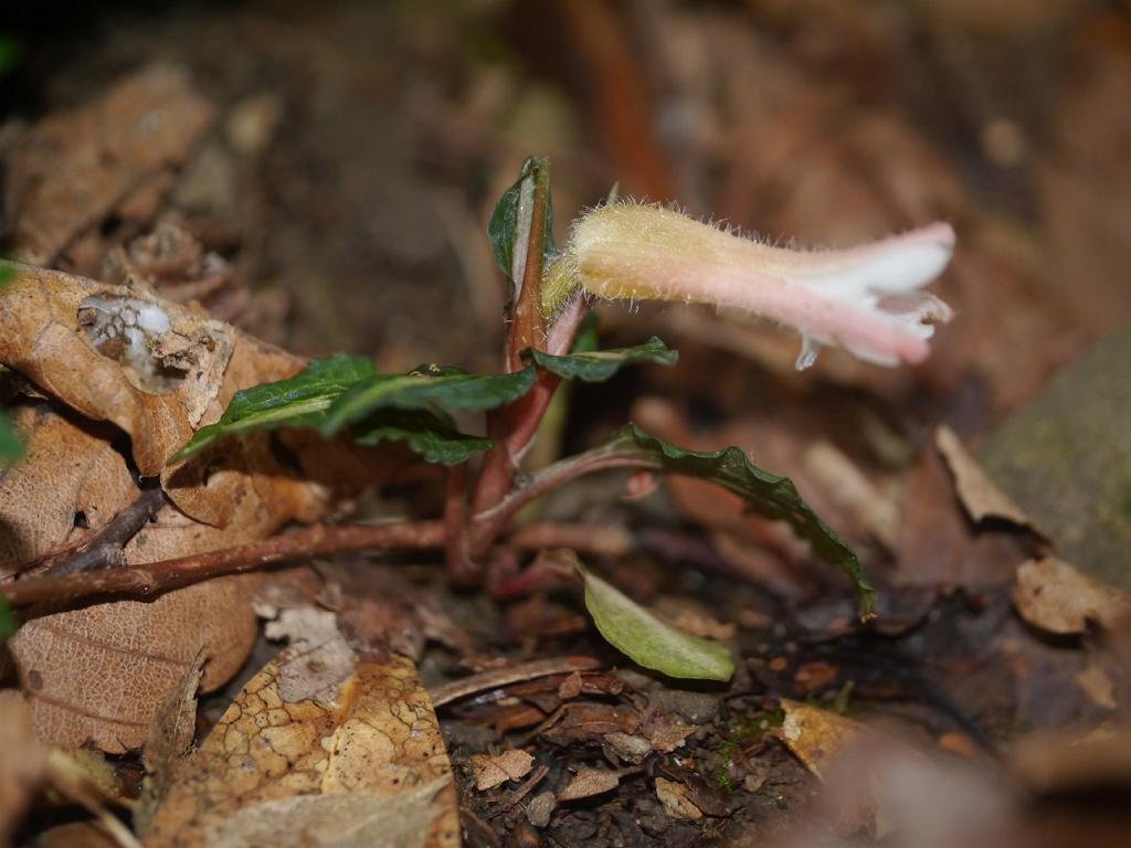 Goodyera biflora：ベニシュスラン 2016/08/05 和歌山県古座川町：Kozagawa town, Wakayama Pref. Japan